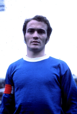 Ferruccio Mazzola con la maglia della Lazio e la fascia di capitano.